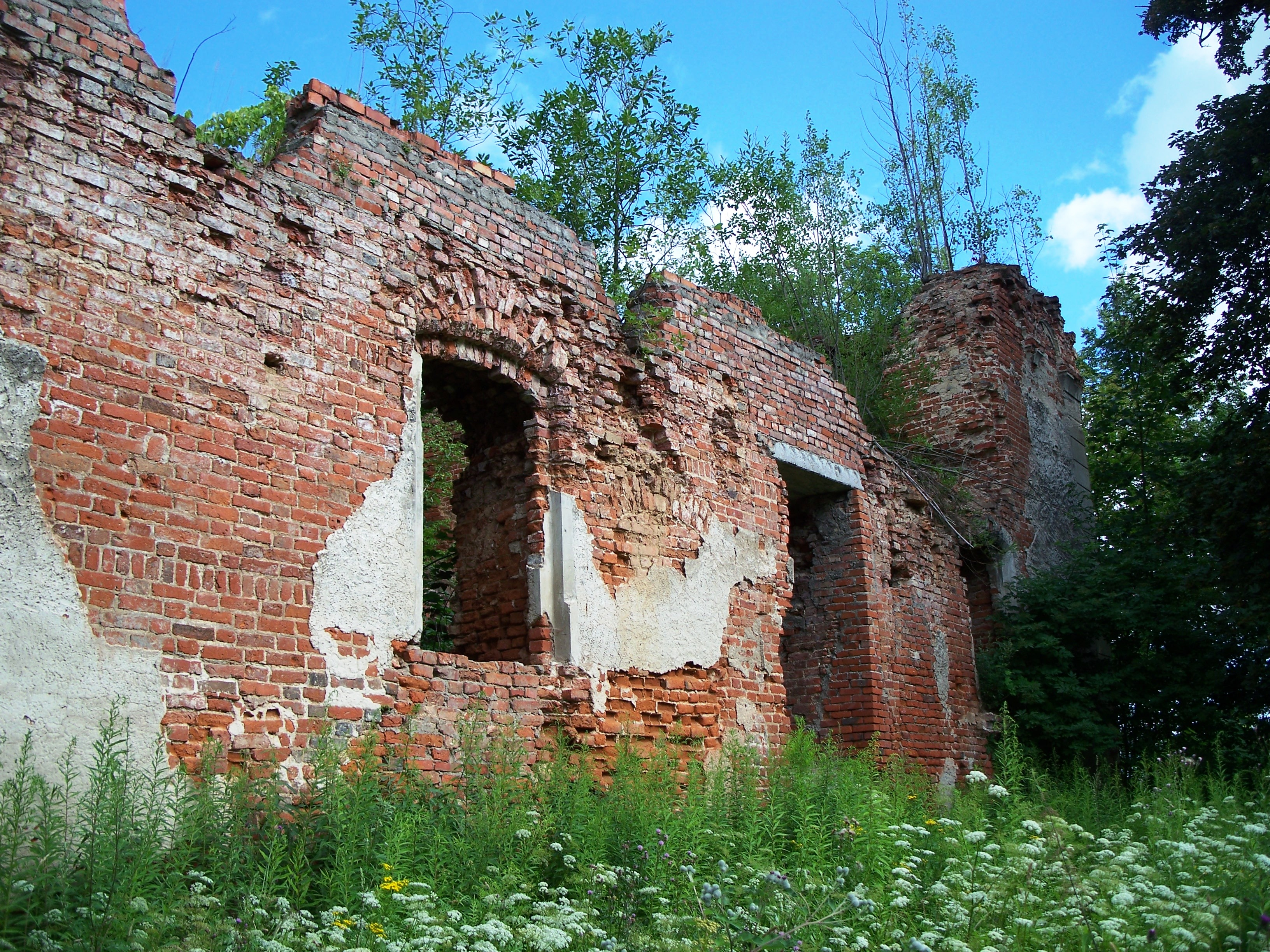 Руины замка «Гердауэн» (Калиниградская область, Правдинск, посёлок железнодорожный, черняховского улица, 27)